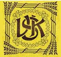 Verband schweizerischer Konsumvereine (V.S.K.), Schweiz